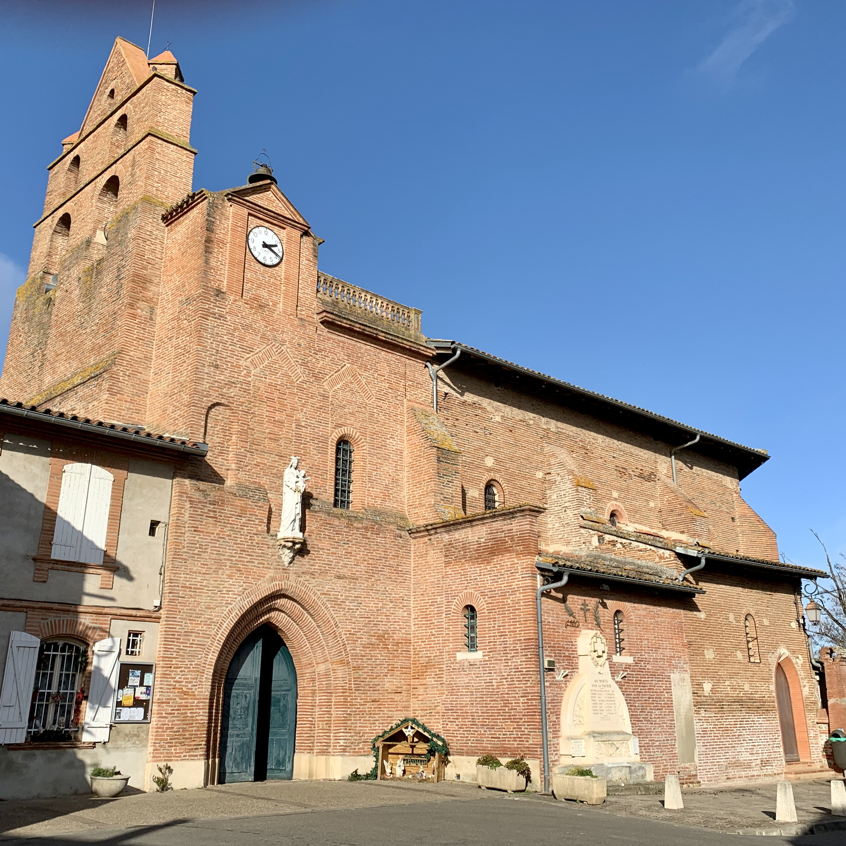 Église Saint-Julien de Beauzelle (Haute-Garonne)